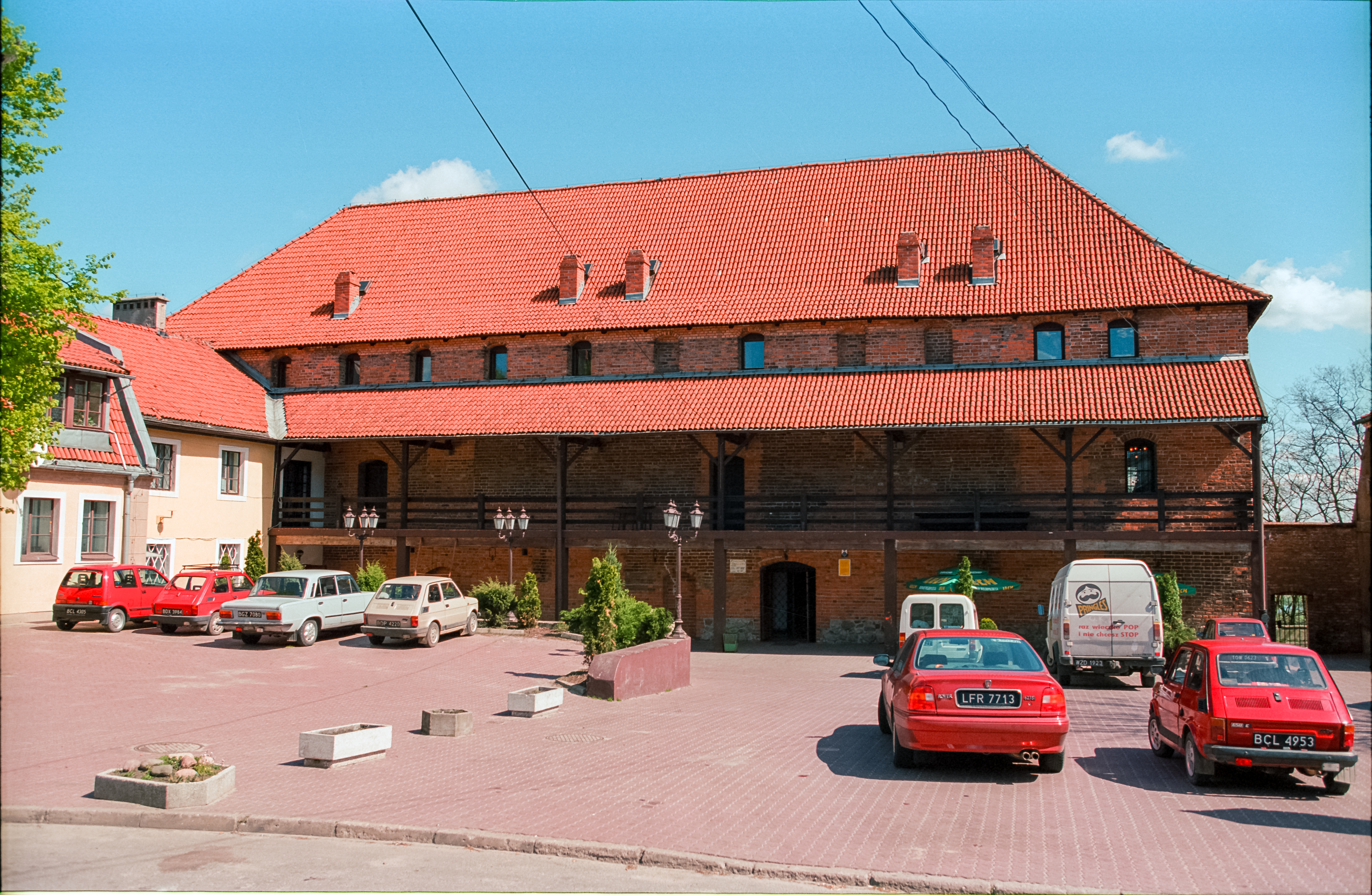 Nowe